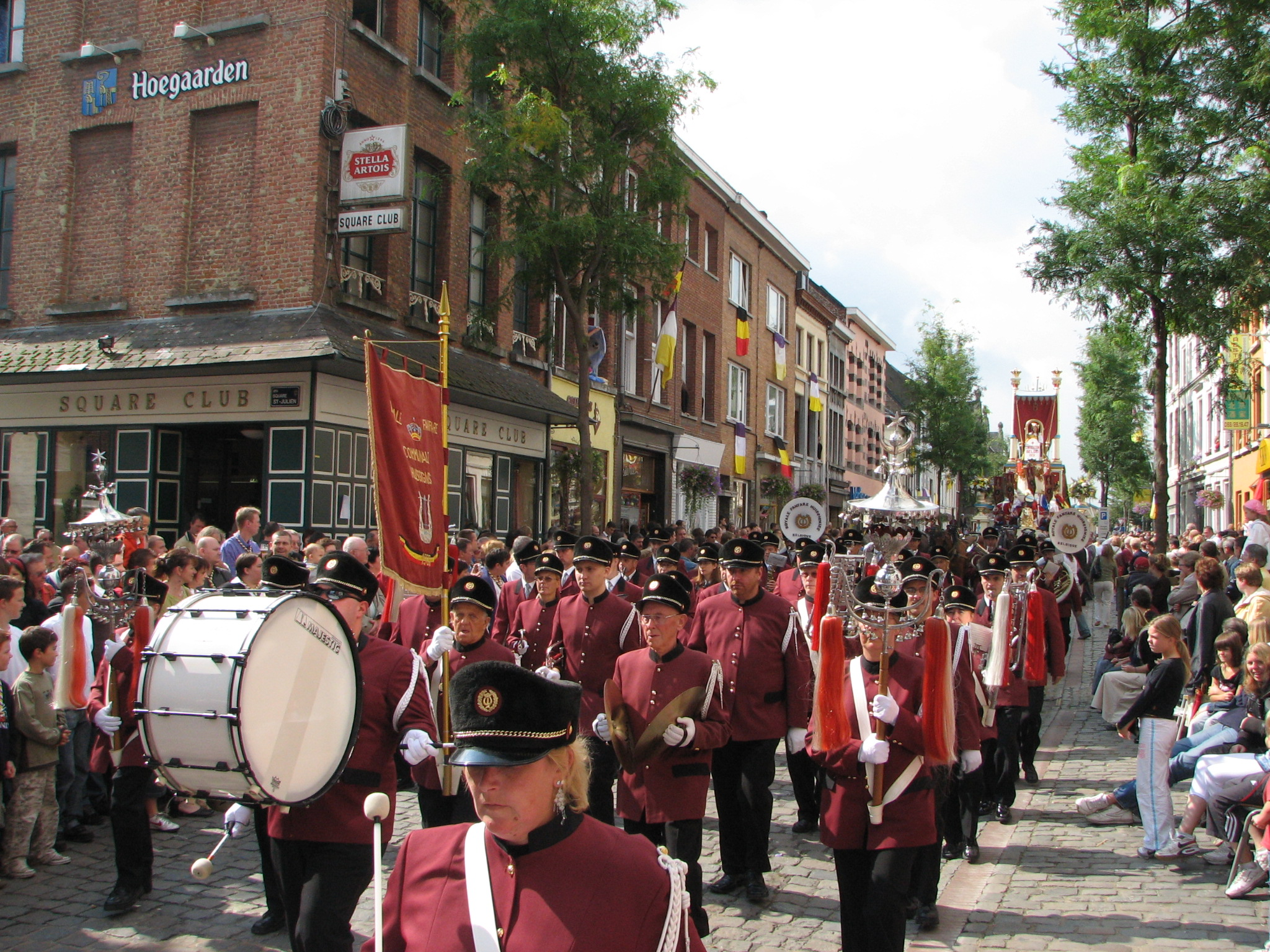 Fanfare de Huissignies la ducasse s'Ath